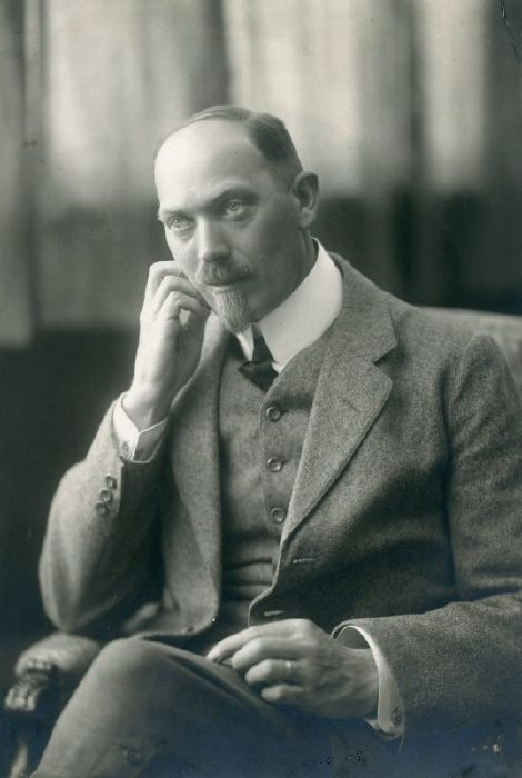 Portræt af Frederik Marius Rasmussen Draiby, fotograf Michelle Alessio Caprani